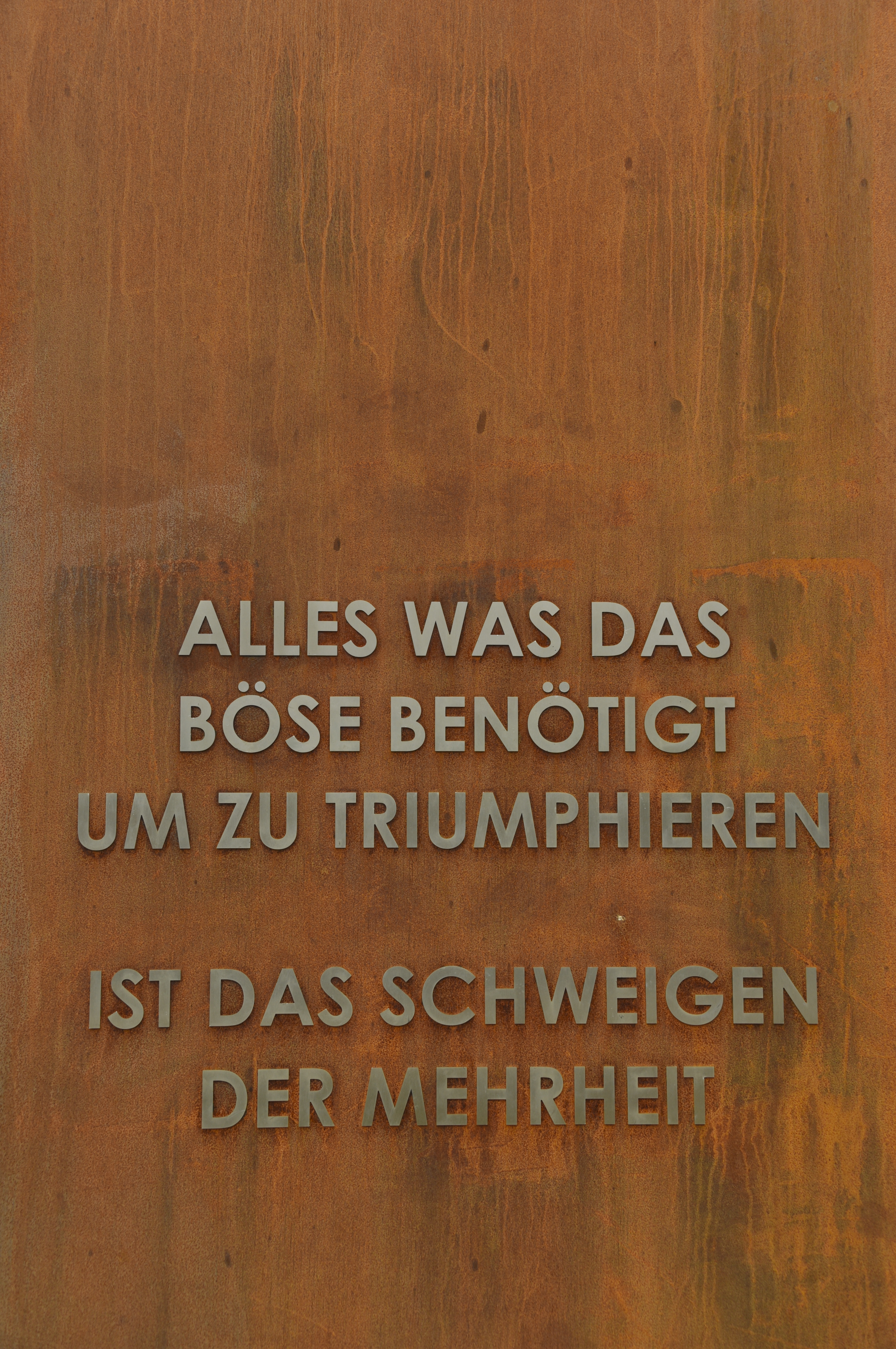 Deatail